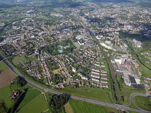 Herford mittels Flugroboter fotografiert